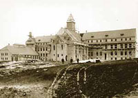 Jugendhilfe Johannesburg in den ersten Jahren des Erziehungsheim